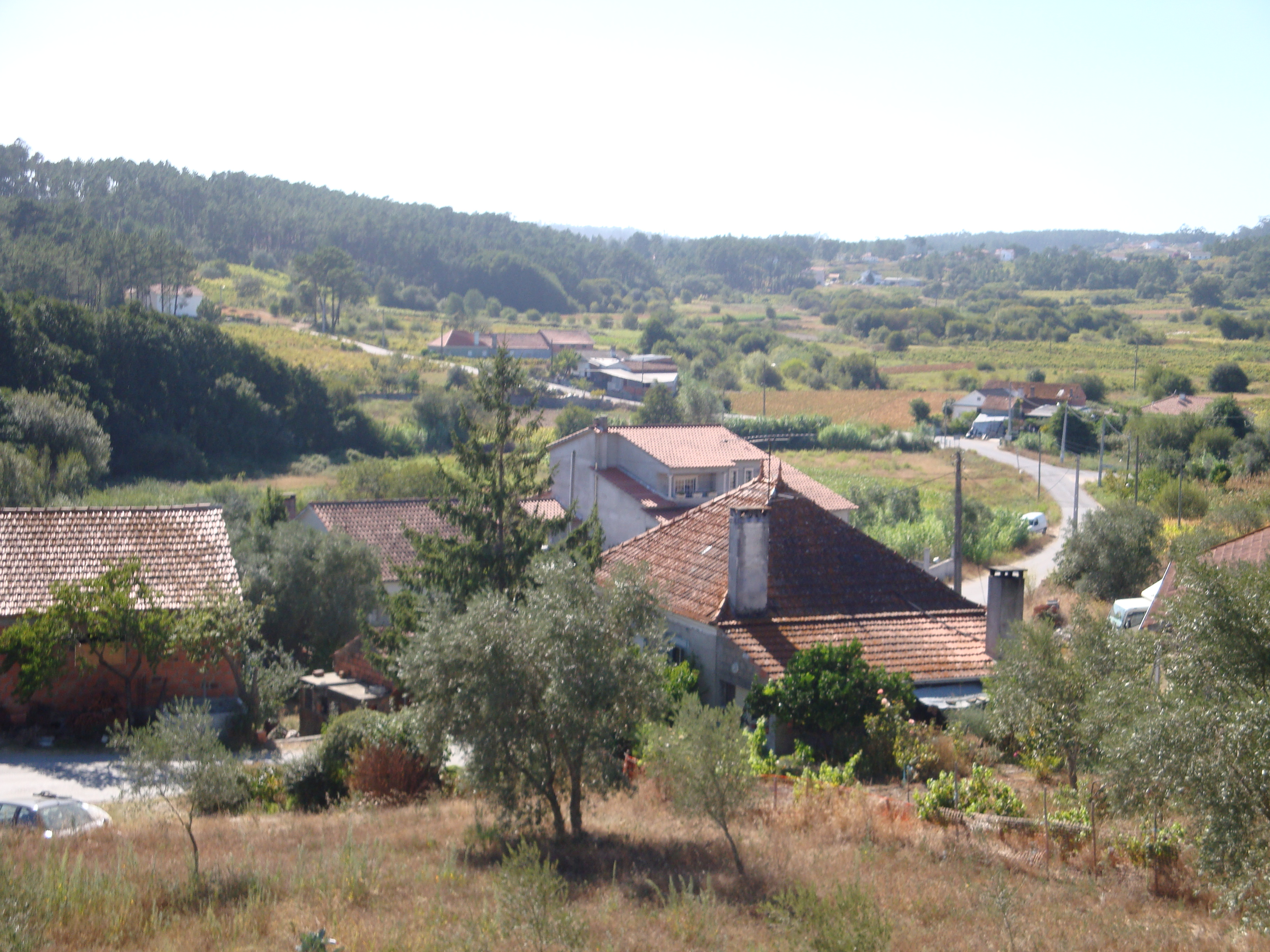 Cacinheira